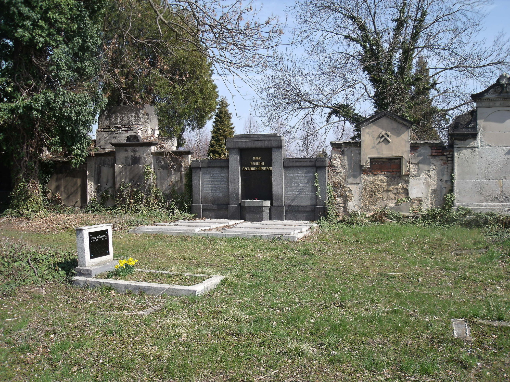 Hrobka Reginalda Czermacka, prezidenta Celorakouského hasičského svazu, který část svého života strávil v Teplicích